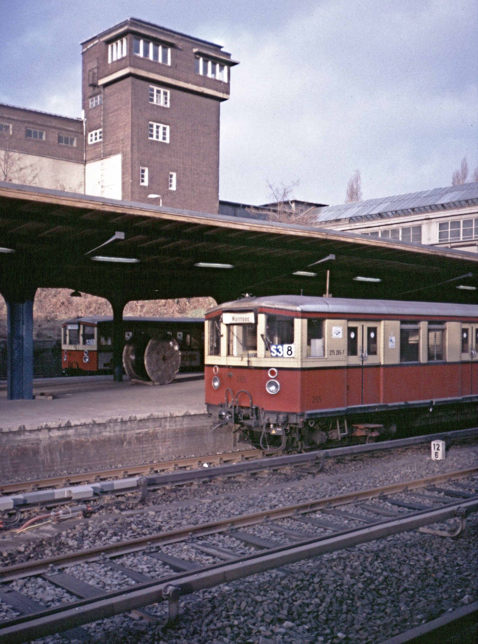 Bahnhof Berlin Westkreuz